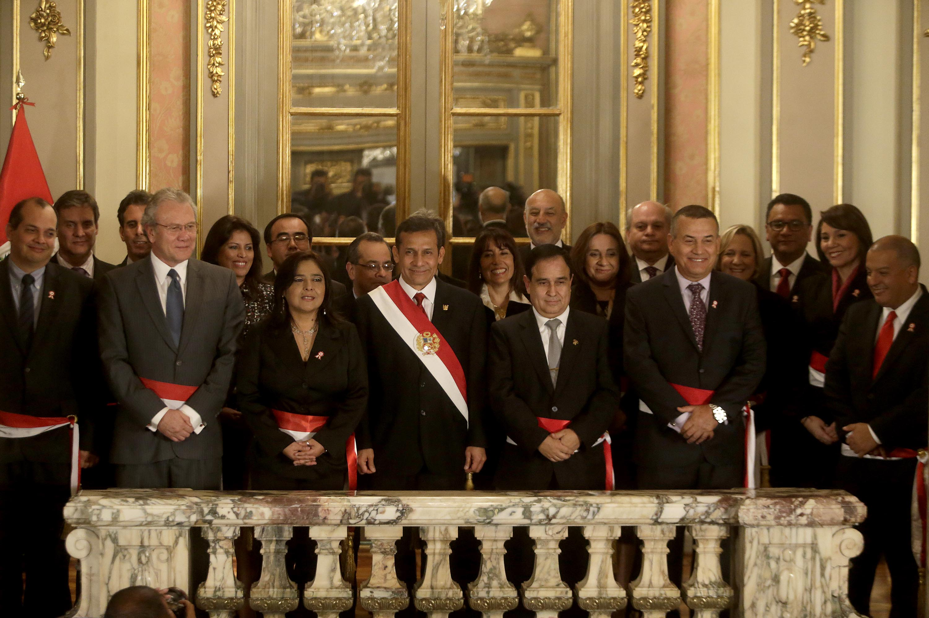 En ceremonia en Palacio de Gobierno, Pedro Cateriano Bellido juramentó al cargo de ministro de Defensa ante el Presidente Ollanta Humala, en el nuevo gabinete ministerial que preside Ana Jara Velásquez.